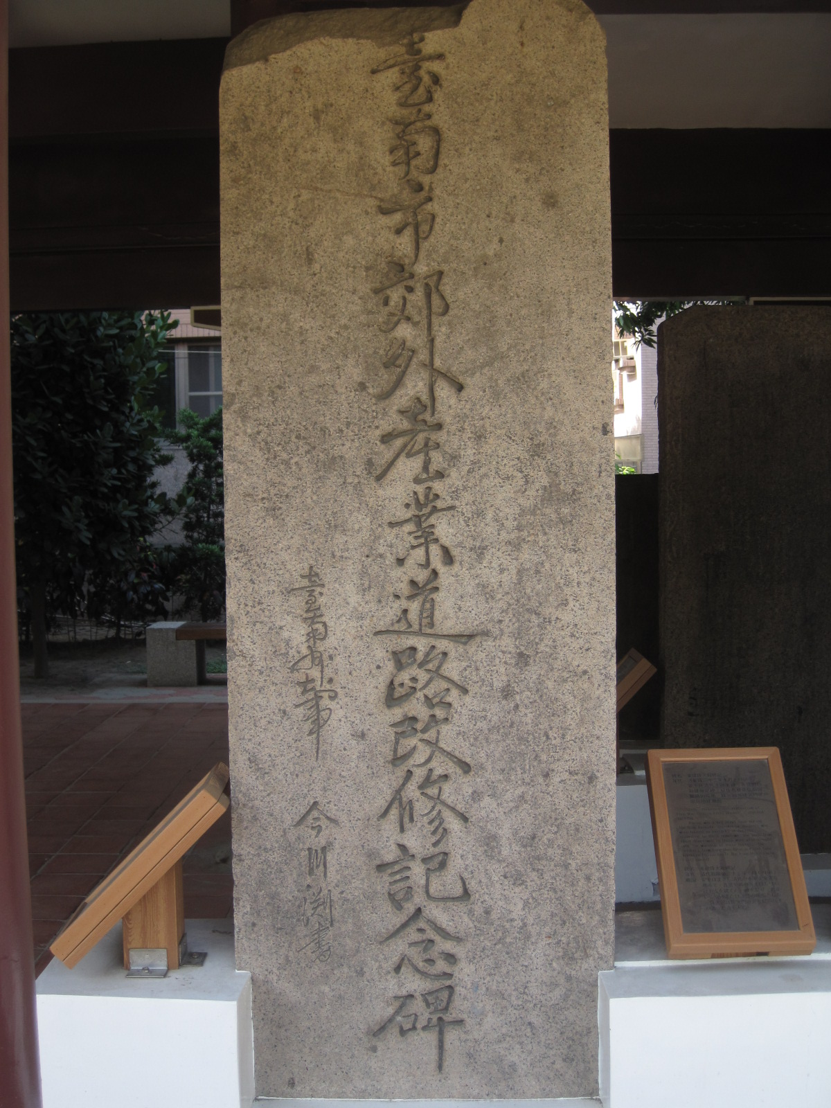 臺灣臺南市南門公園碑林石碑之一